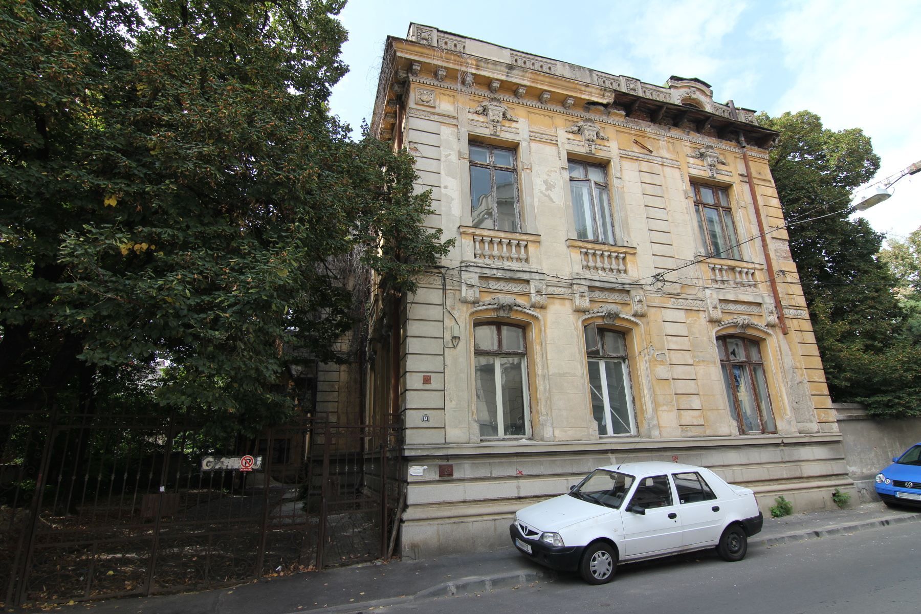 Casă pe Radu Calomfirescu